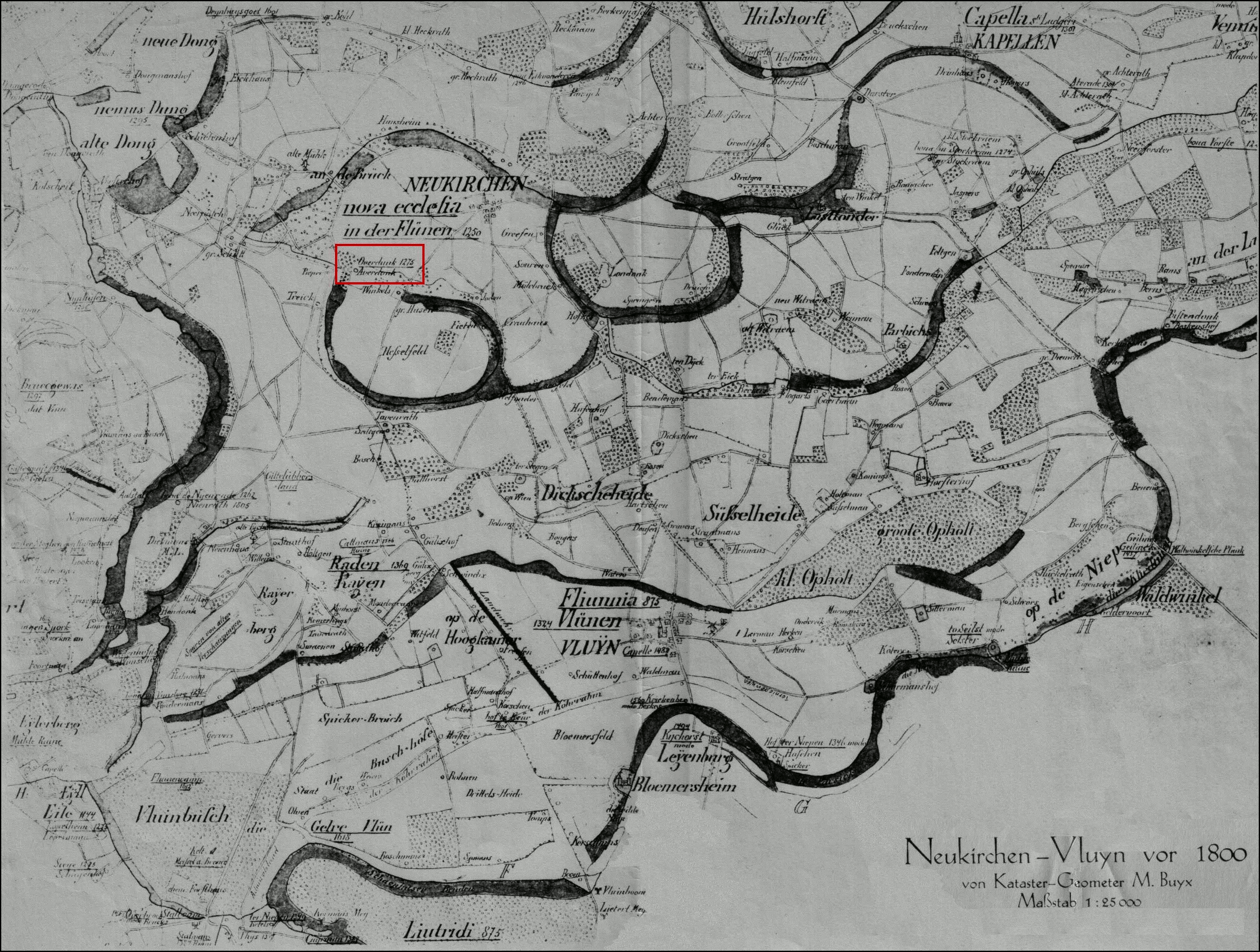 Karte von Neukirchen-Vluyn vor 1800 von Kataster-Geometer M. Buyx